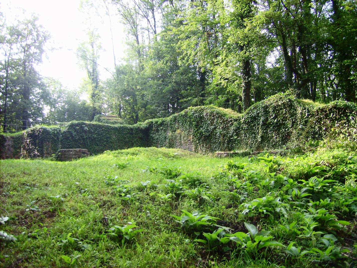 Rüdenburg Arnsberg - Trennmauer zwischen Vor- und Hauptburg von Süden